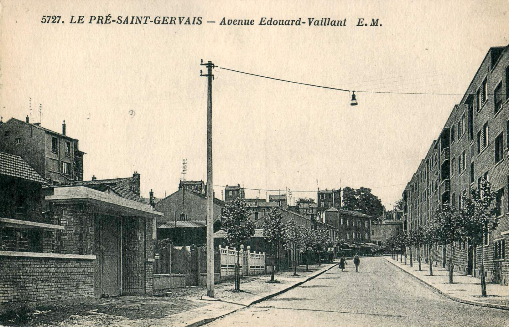 Carte postale ancienne éditée par EM n°5727 :Le Pré-Saint-Gervais - Avenue Édouard-Vaillant.À droite, la Cité-Jardin du Pré-Saint-Gervais.